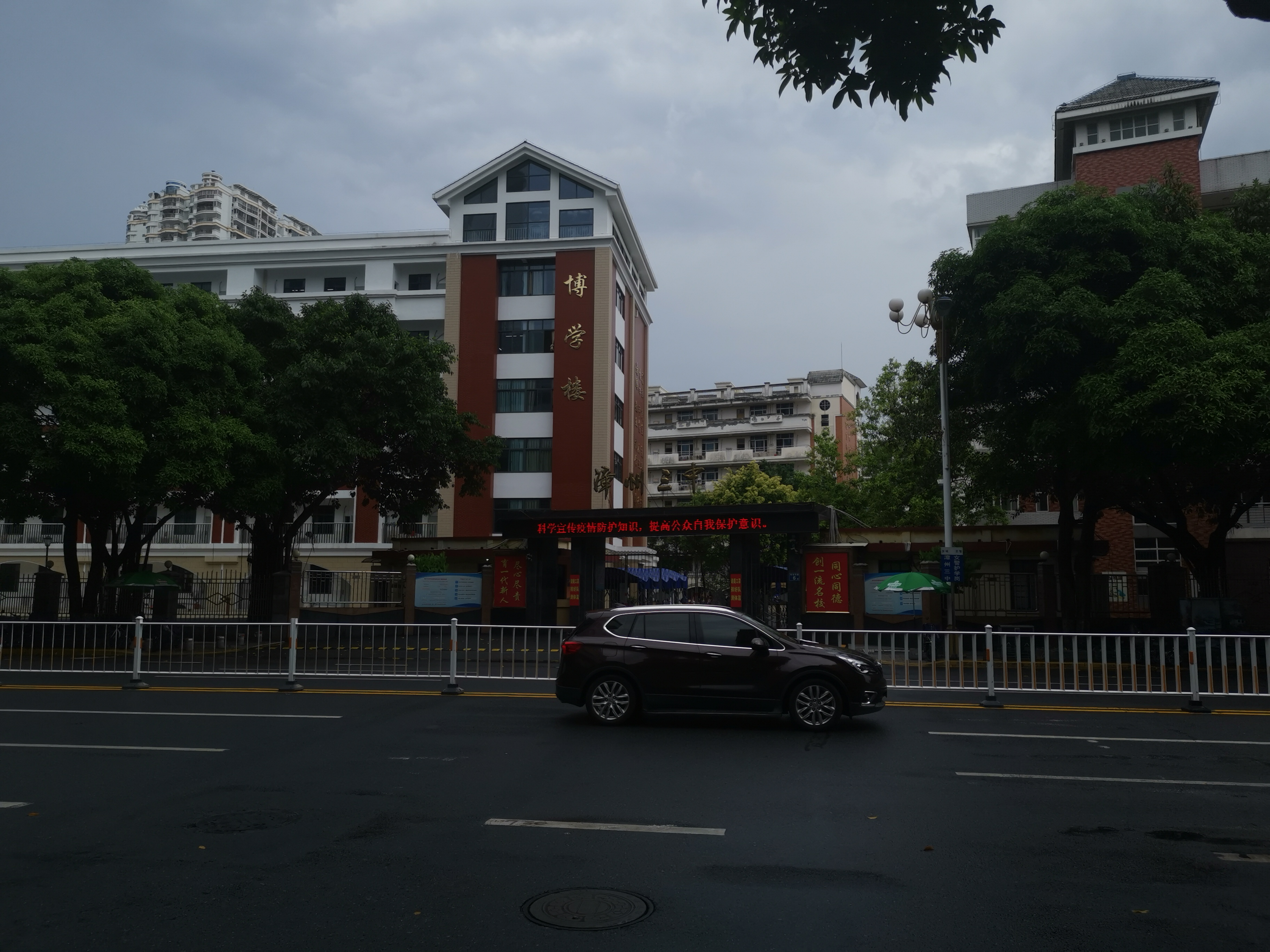 中文（中国大陆）: 漳州三中